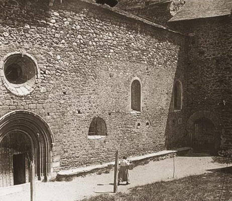 Façana de l'església de Benasc amb una dona. Santiago Perdigó i Díaz Caneja (1916-08)